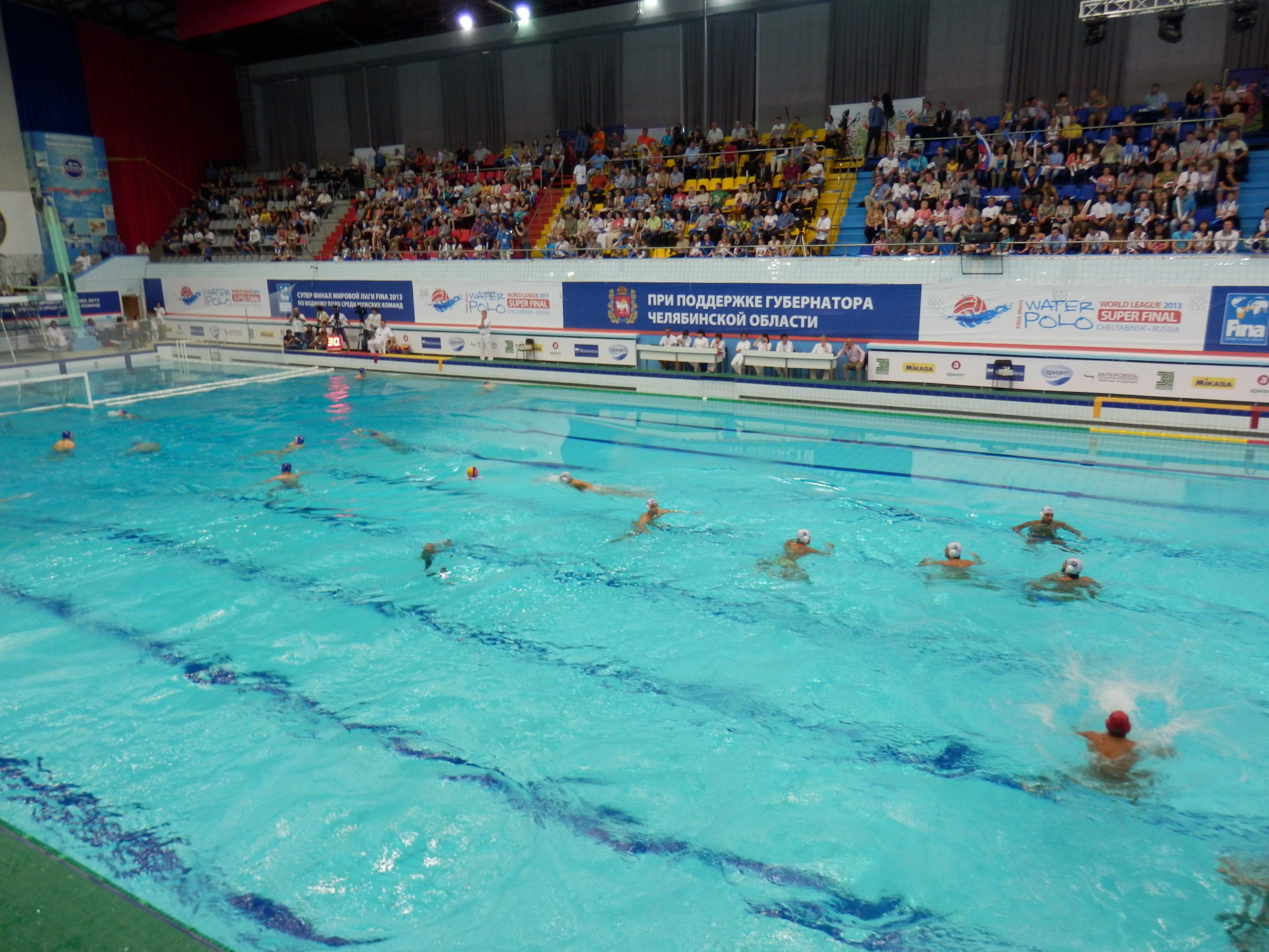 Розыгрыш мяча